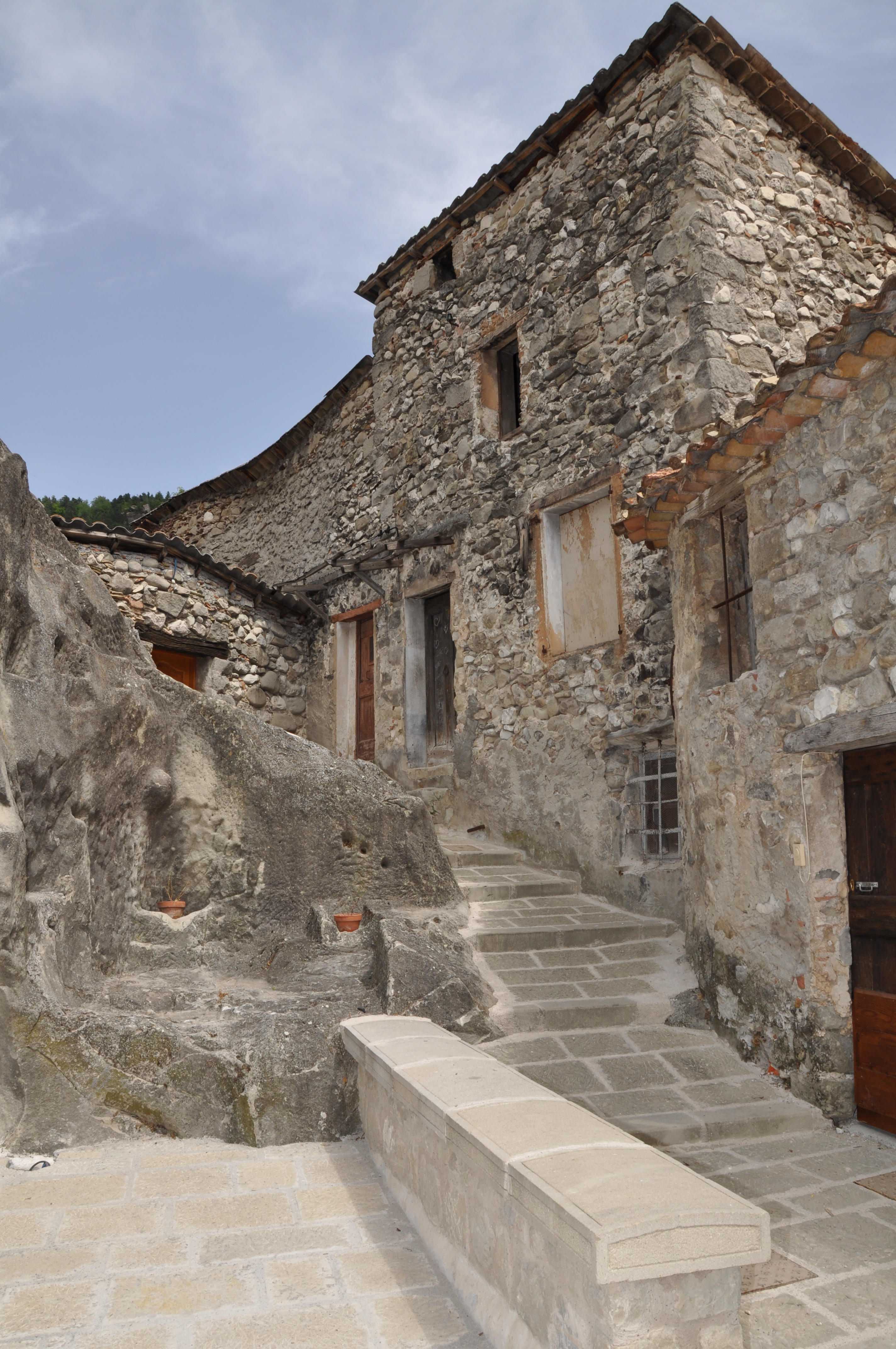 Maison d'Annot